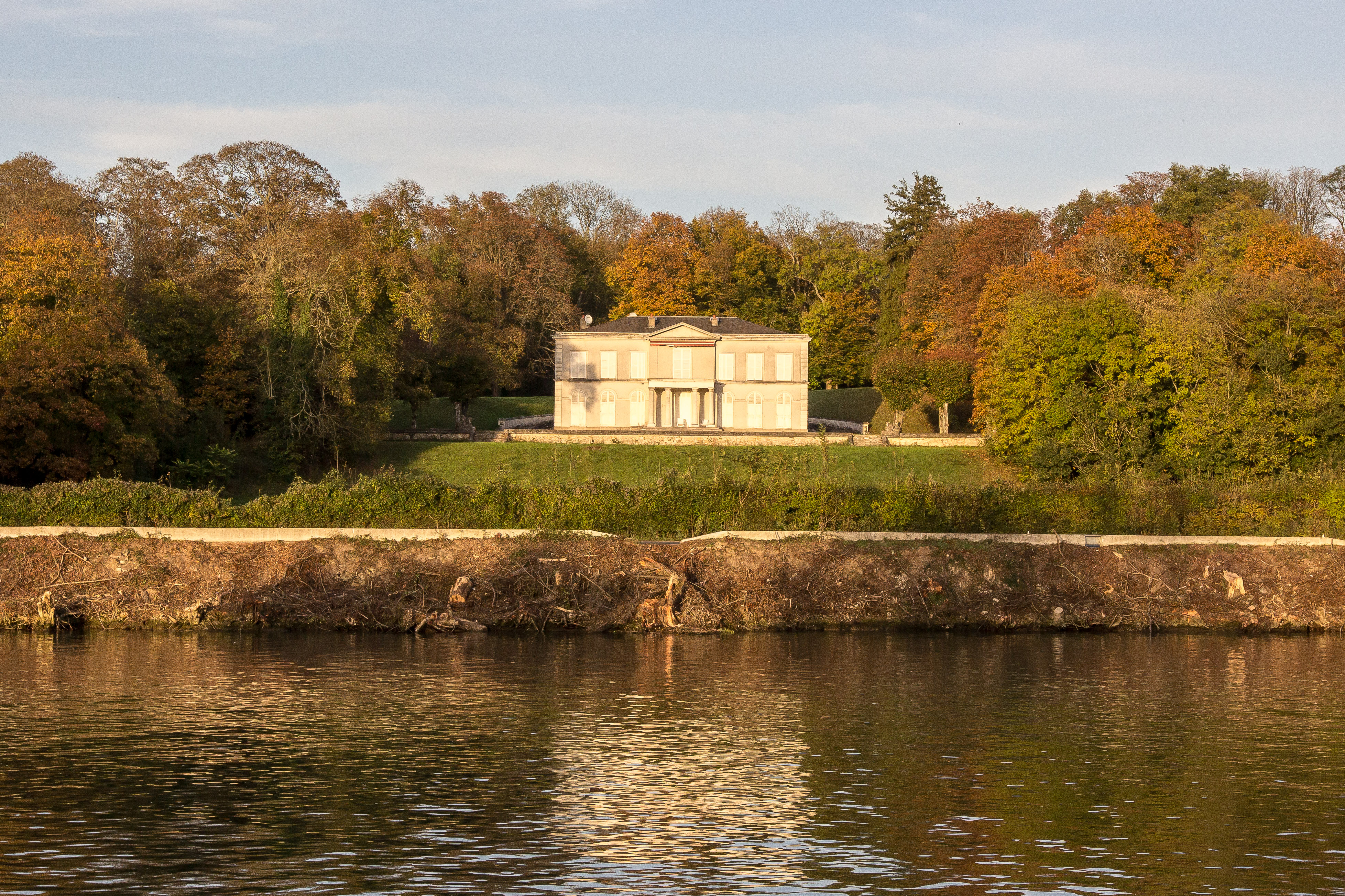 La Seine à Boissise-le-Roi (Boissise-le-Roi - Seine-et-Marne - France)